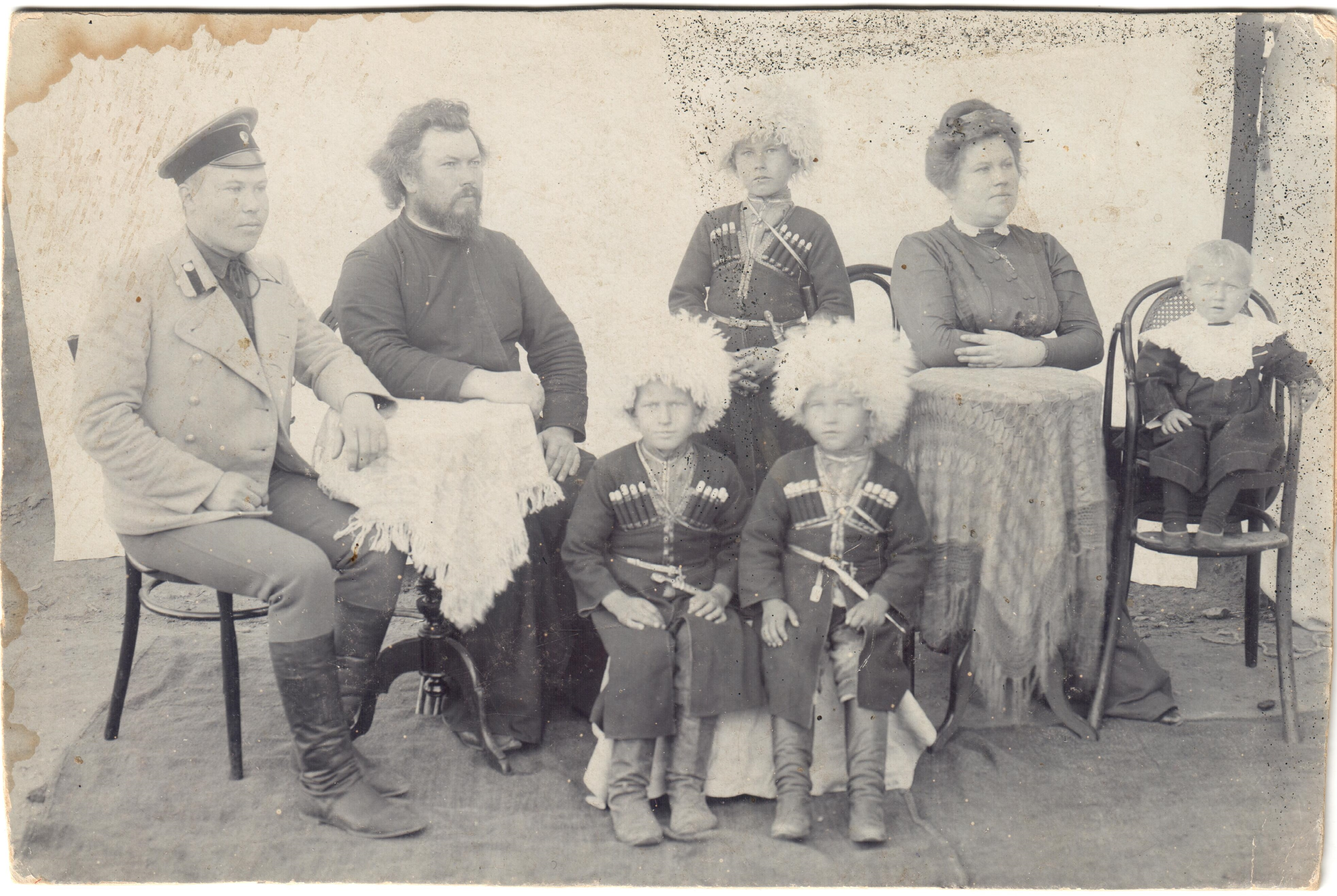 Фотография семьи священника Попова Алексея Ивановича, проживавших до 1917 года в станице Слащевская.